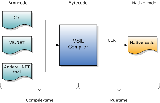 Een globaal schema van de .NET architectuur